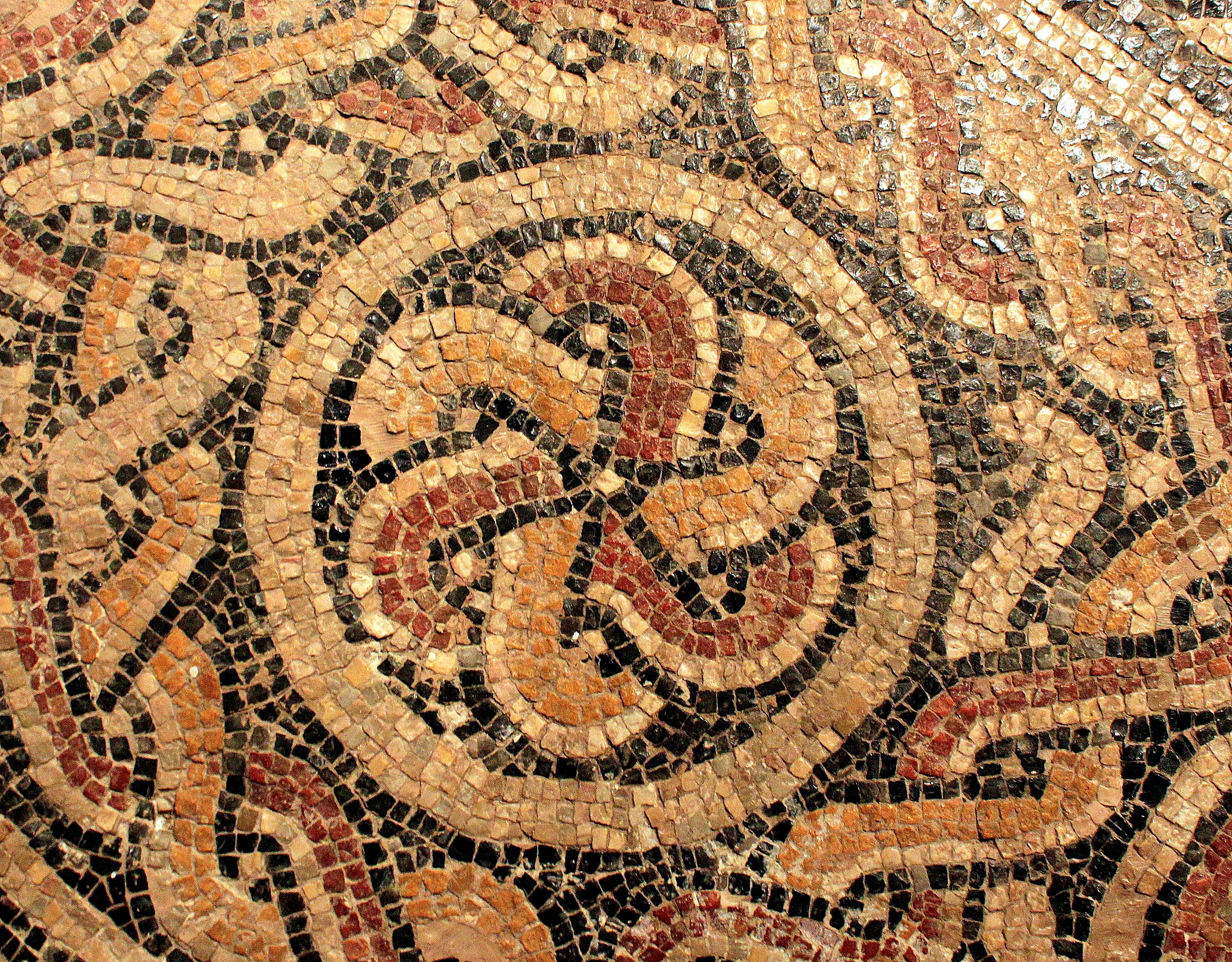 Camino de la Vega de Albalate (Calanda, Teruel). El mosaico: detalle (7)